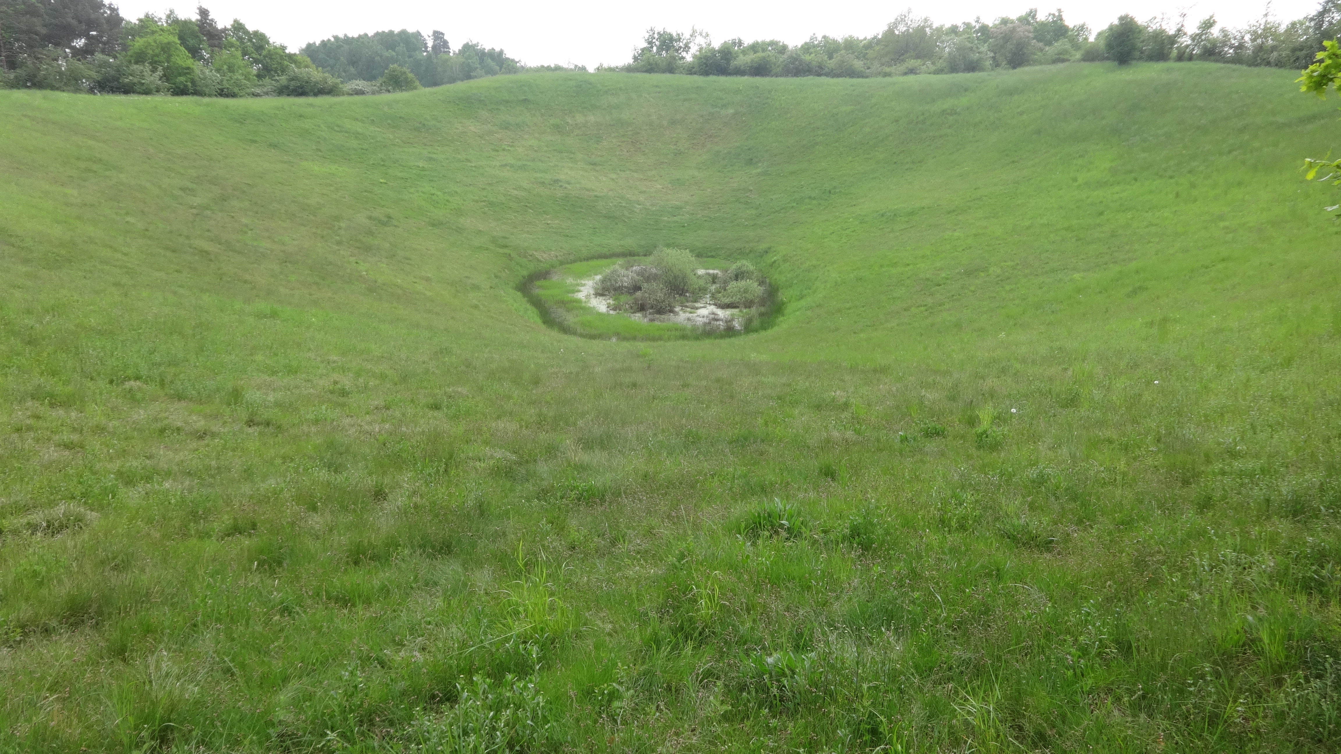 Osauge von Osten